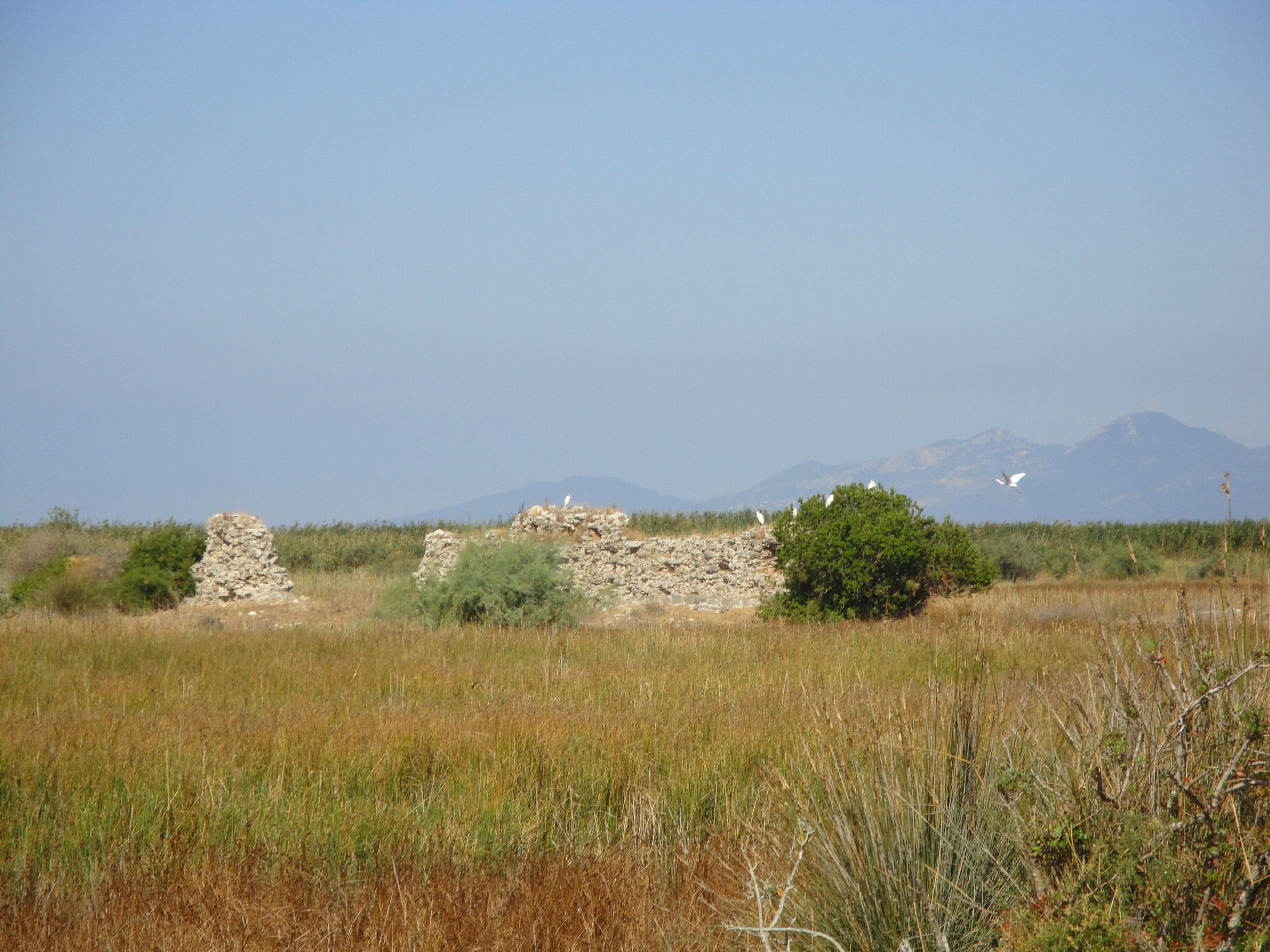 Μερική άποψη της ΝΑ πλευράς του κάστρου Άμβρακος ή Φιδόκαστρου. Στα τείχη που εξακολουθούν να διακρίνονται από τη βλάστηση έχουν πρόσβαση μόνον οι ερωδιοί...